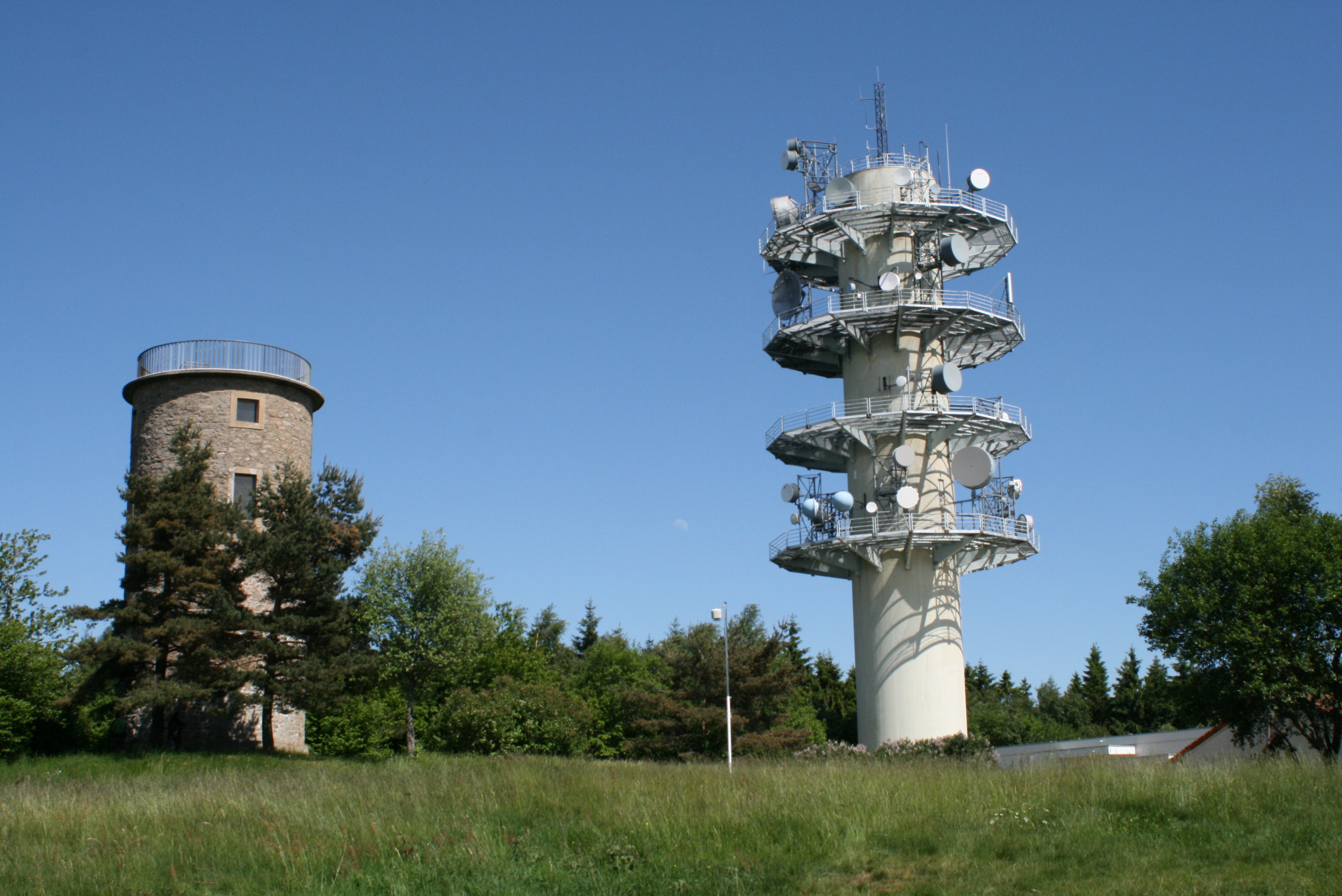 Les deux tours du mont Boussuivre, Violay (Loire)